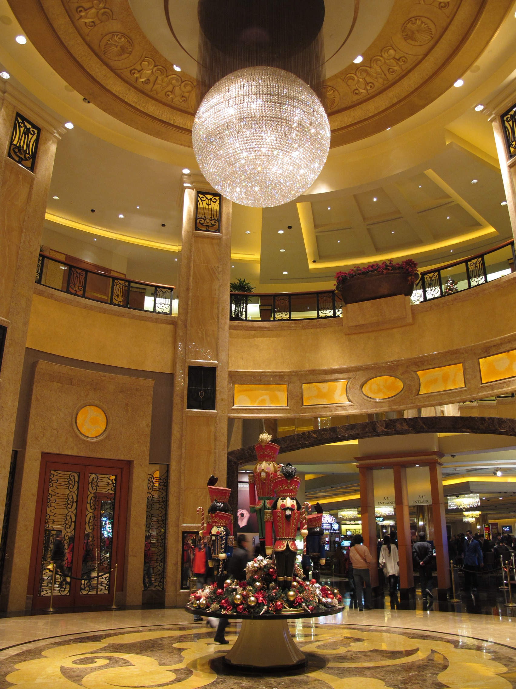 MGM Macau Casino Enterance